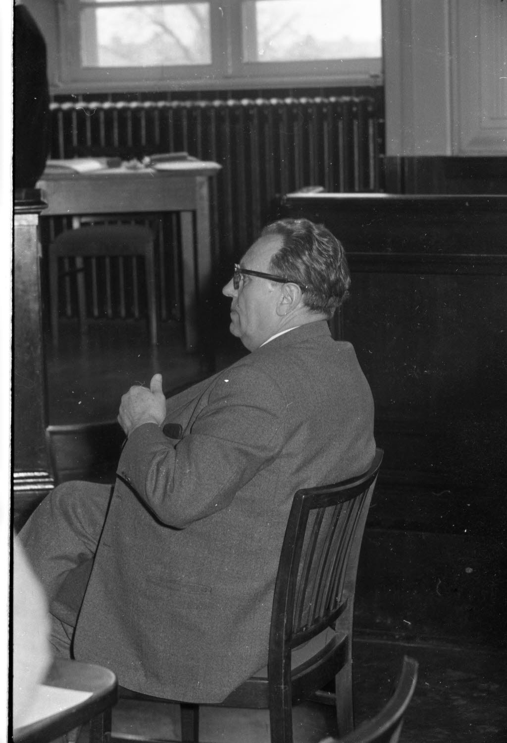 im Kieler Schwurgericht. Ehem. SS-Sturmbannführer und Leiter des Einsatzkommandos 8 Otto Bradfisch (rechts) als Zeuge.